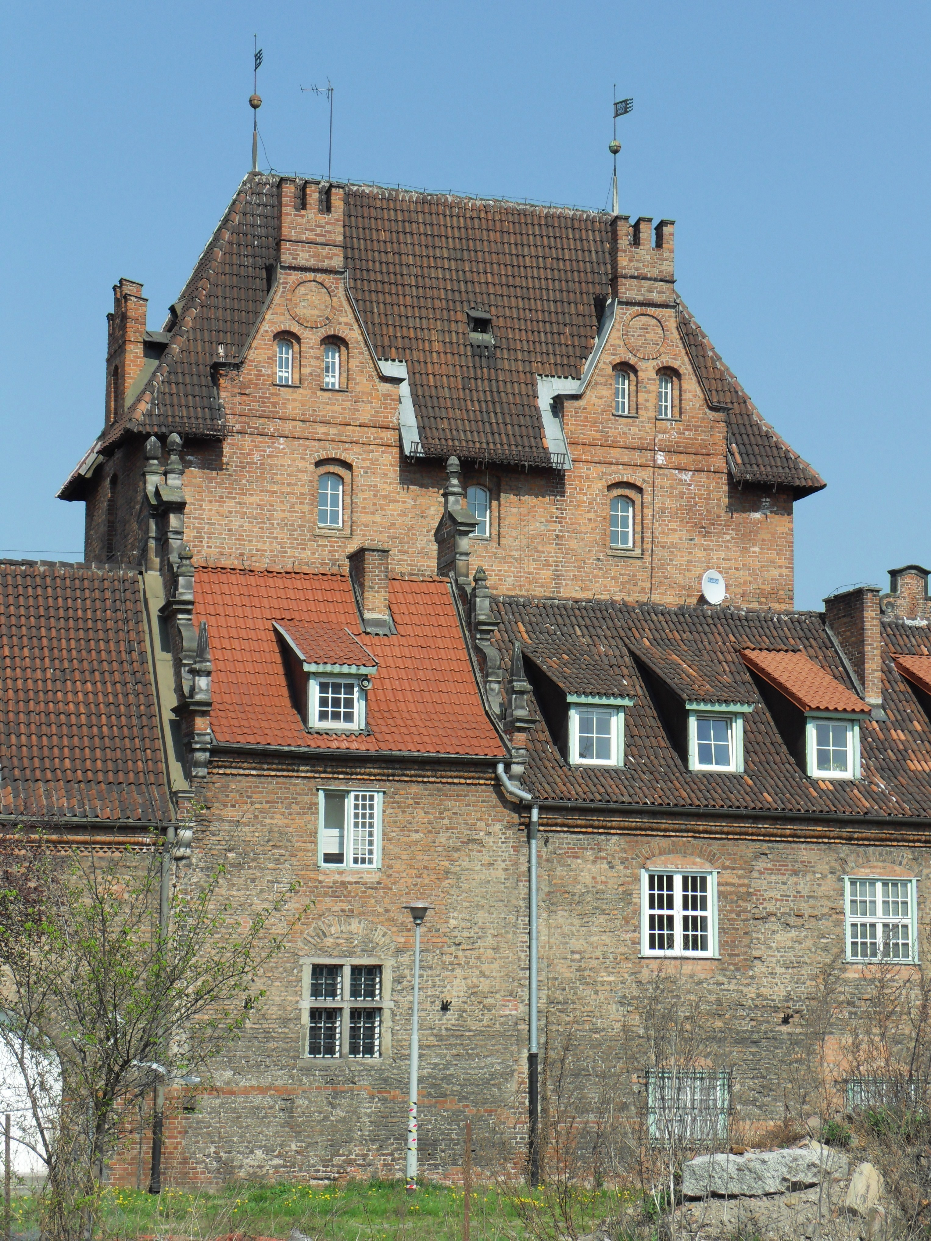 Baszta Schultza w Gdańsku - strona zewnętrzna. Na pierwszym planie budynek południowy Dworu Miejskiego.